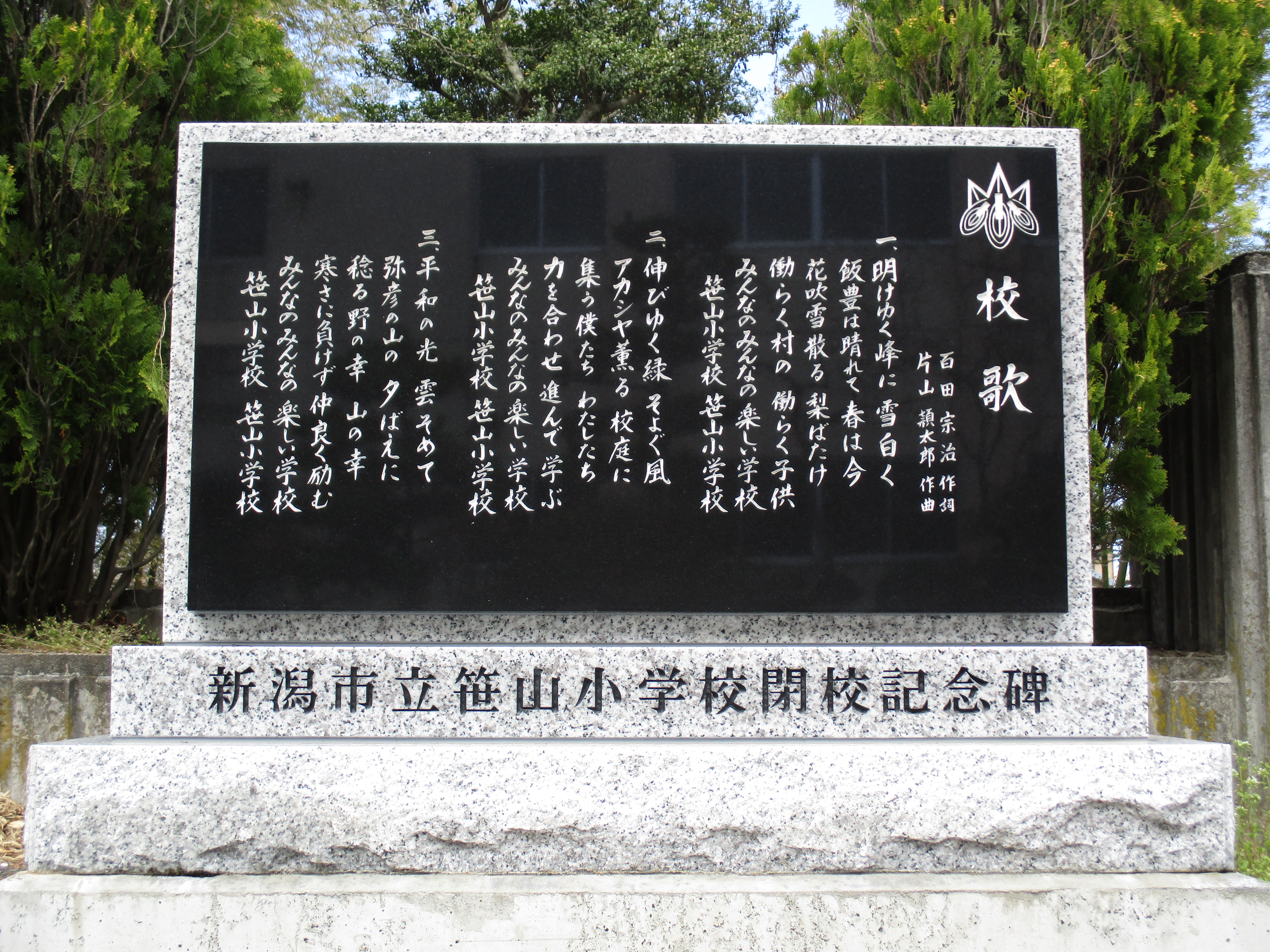 閉校記念碑 正面 - 新潟市立笹山小学校